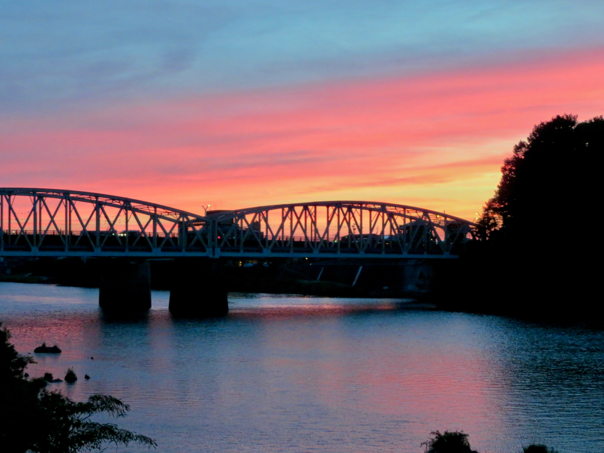 夕暮れ時の犬山橋。